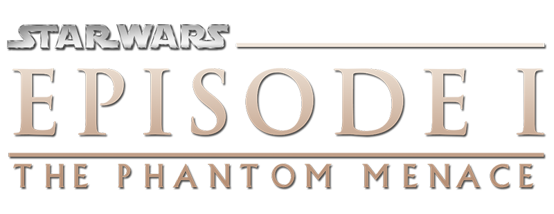 Logotipo